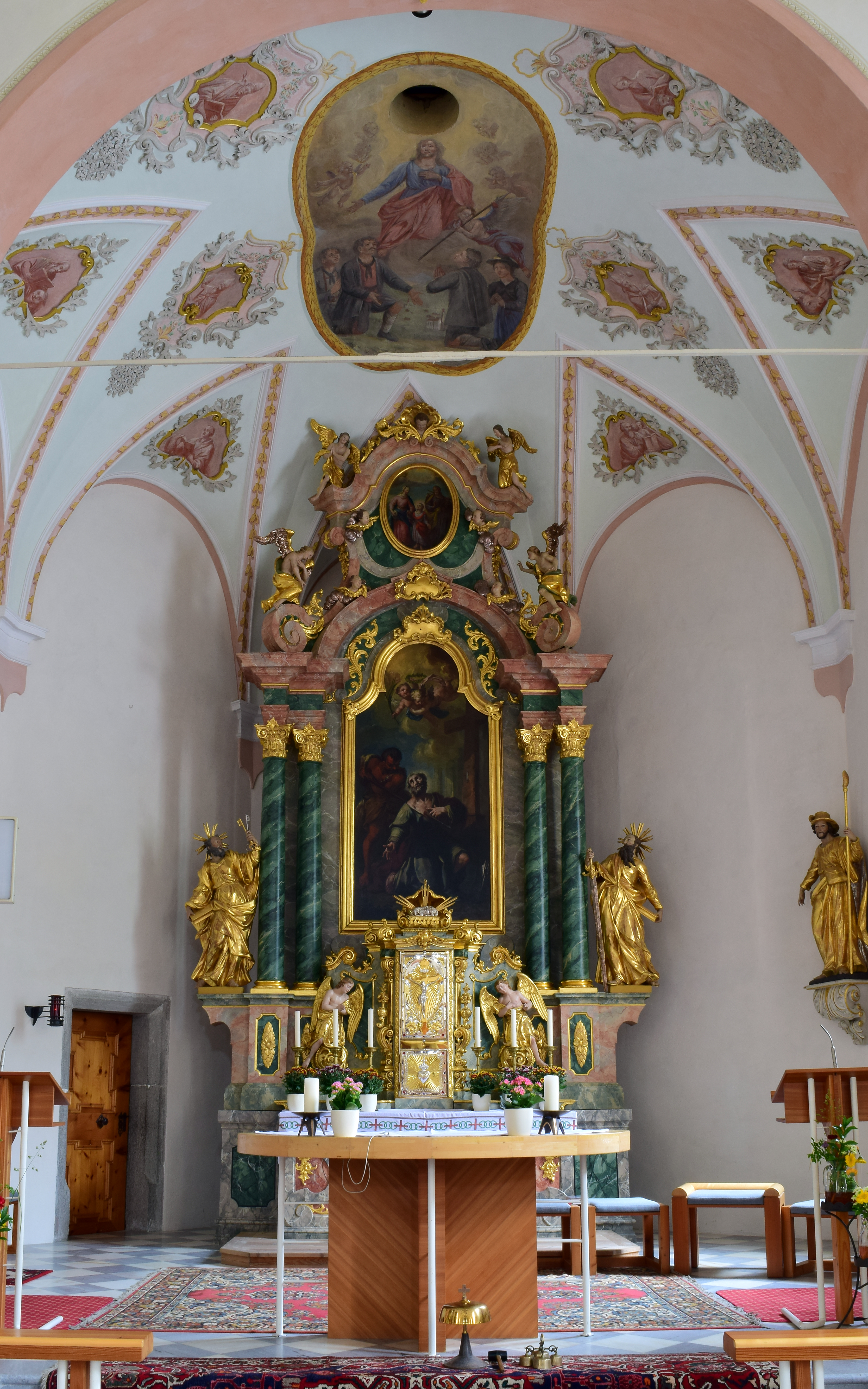 Kath. Pfarrkirche hl. Thomas mit Aufbahrungshalle